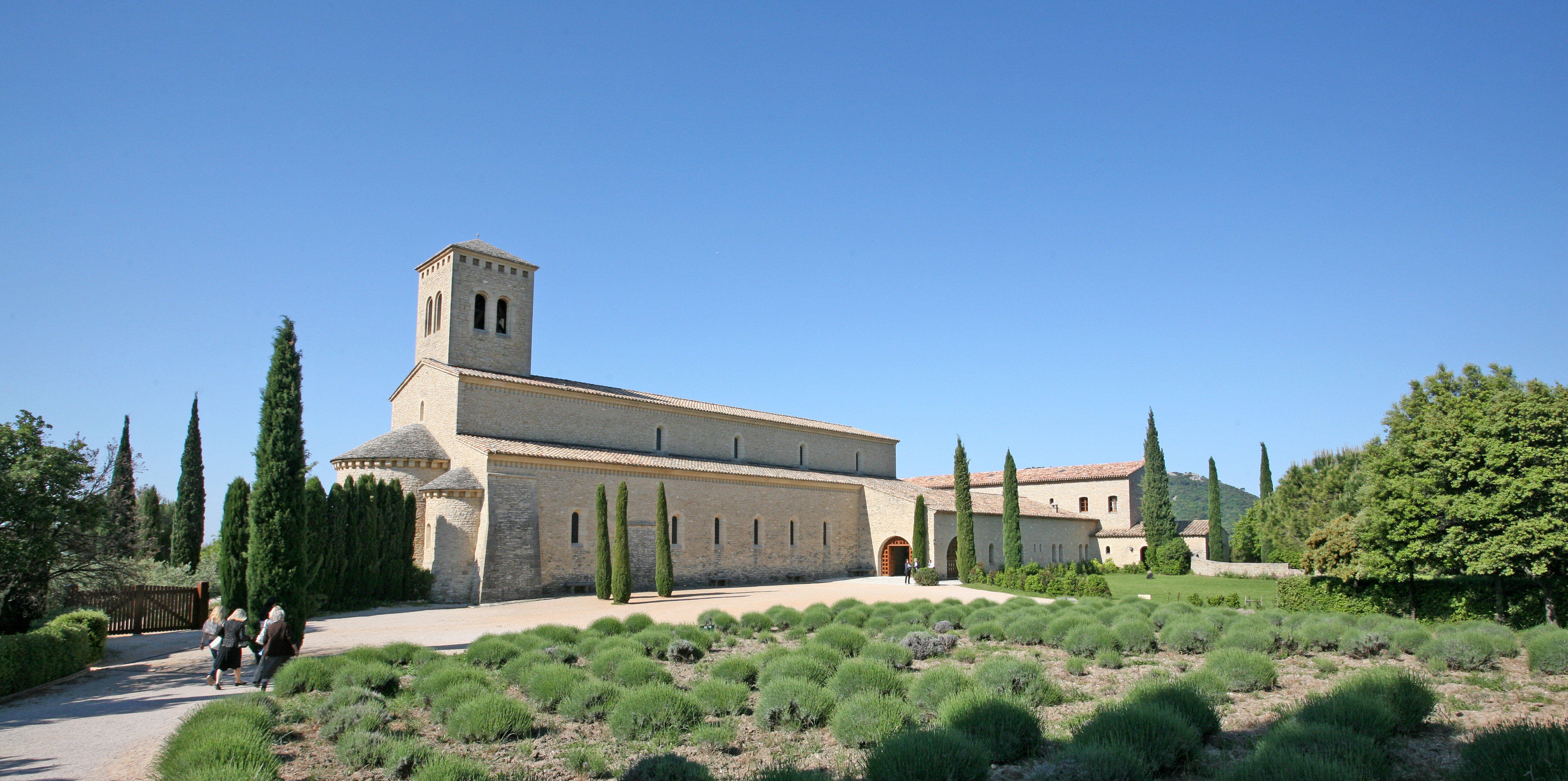 L'arrivée sur l'abbatiale de l'Abbaye Sainte-Madeleine du Barroux, Vaucluse, France.